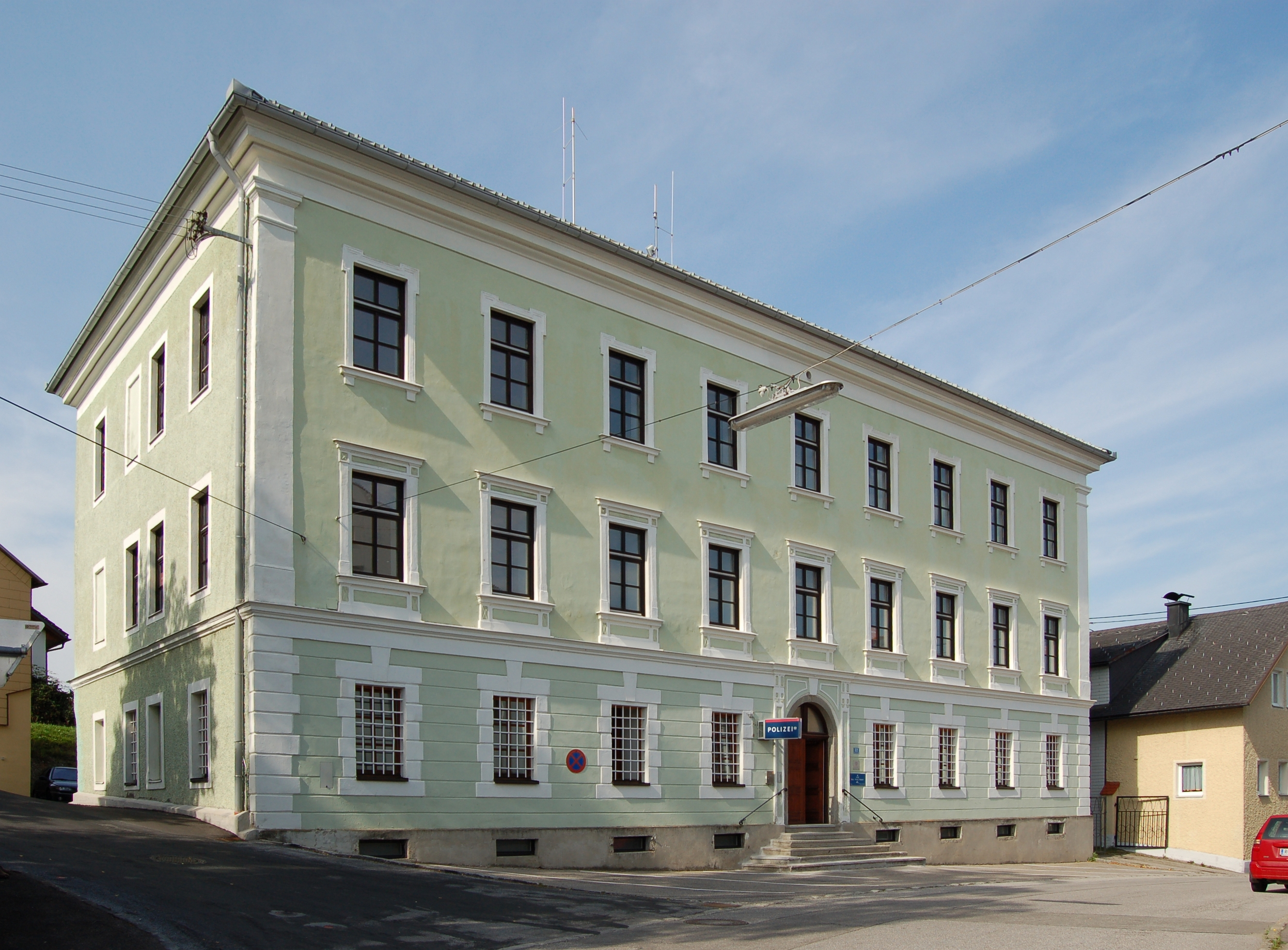 Das denkmalgeschützte, ehemalige Gerichtsgebäude in Lembach im Mühlkreis entstand 1856 als dreigeschoßiger Bau mit flachem Walmdach.